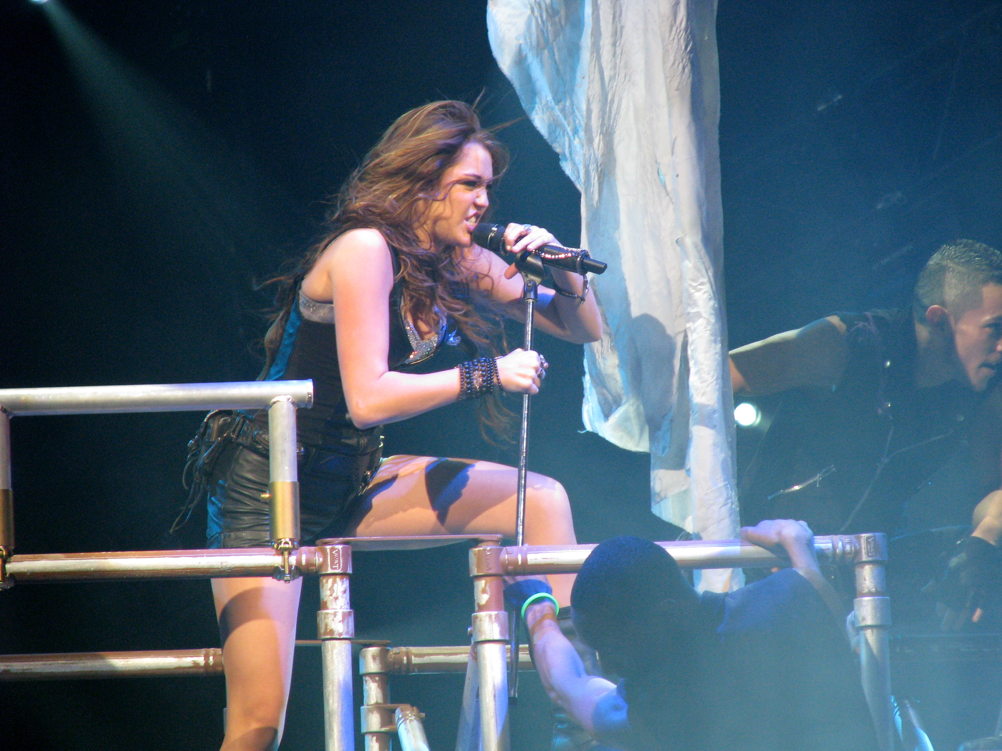 A teen singing.